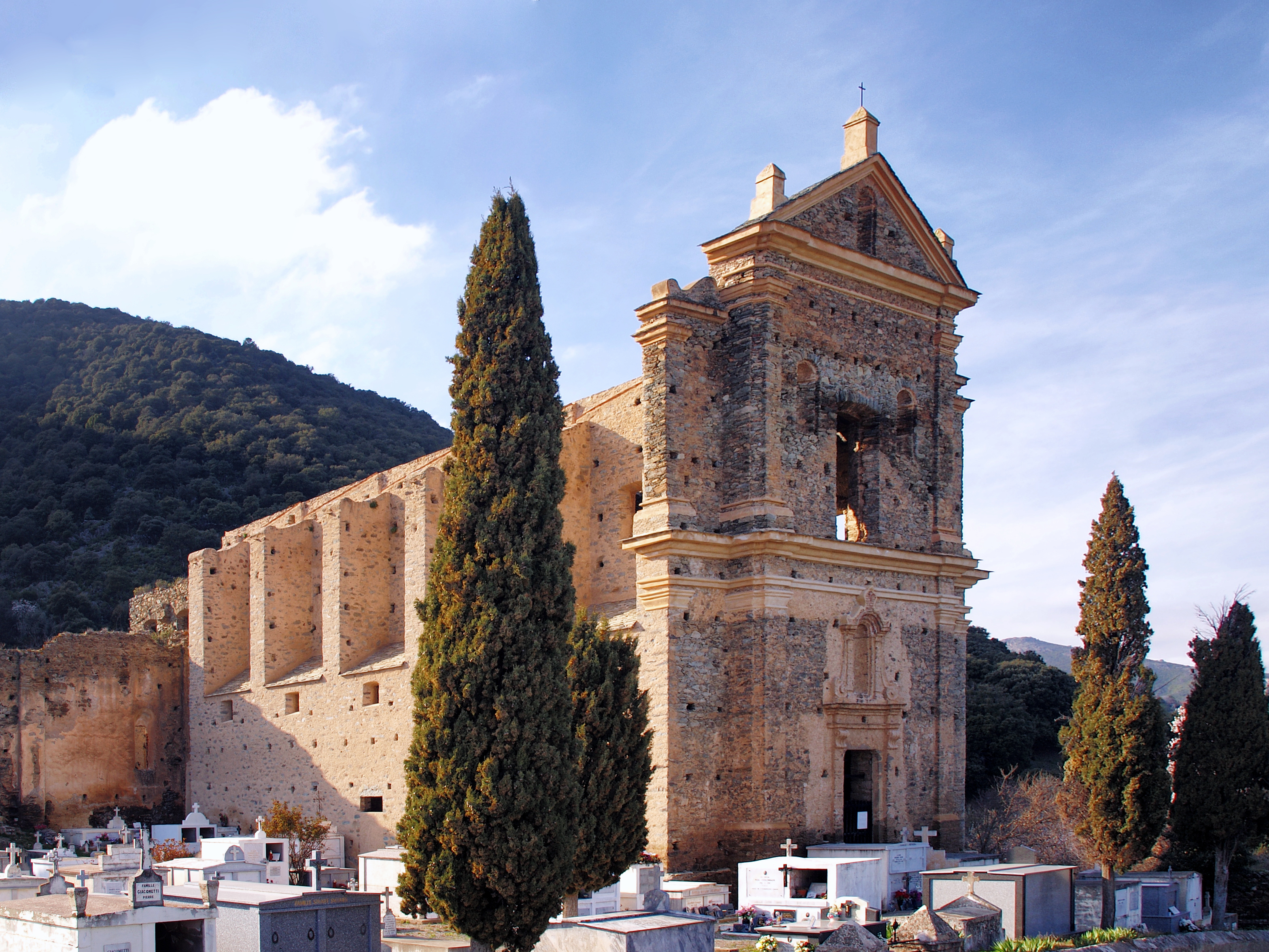 Castifao, Vallée d'Asco (Haute-Corse) - L'ancien couvent de Caccia.